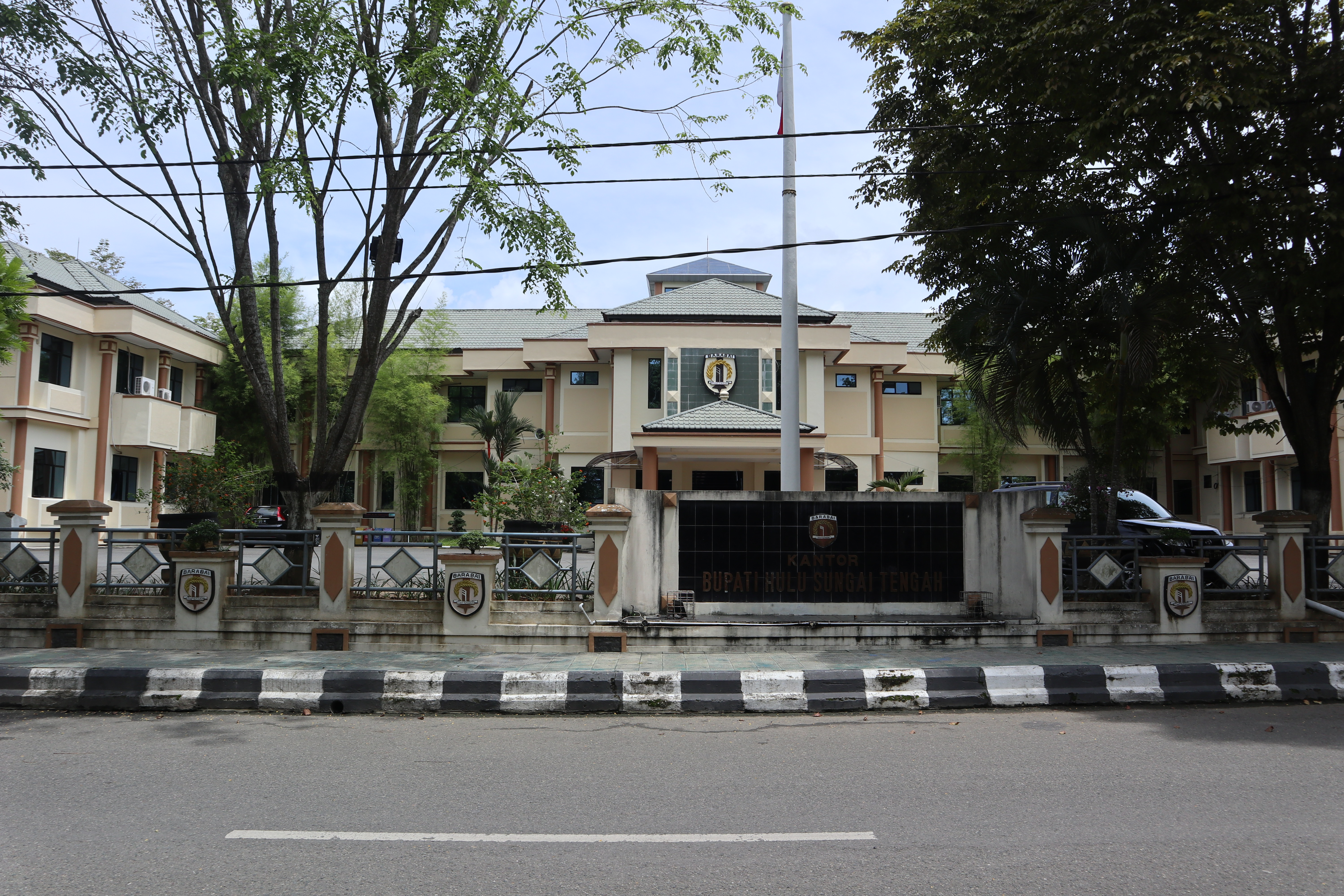 Kantor Bupati Hulu Sungai Tengah di kota Barabai.